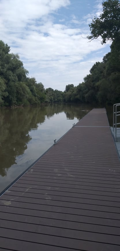 Kishajókikötő a Bodrogon Sátoraljaújhely mellett